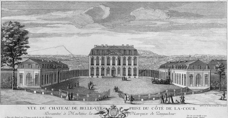 Château de Bellevue à Meudon, vu du côté de la cour